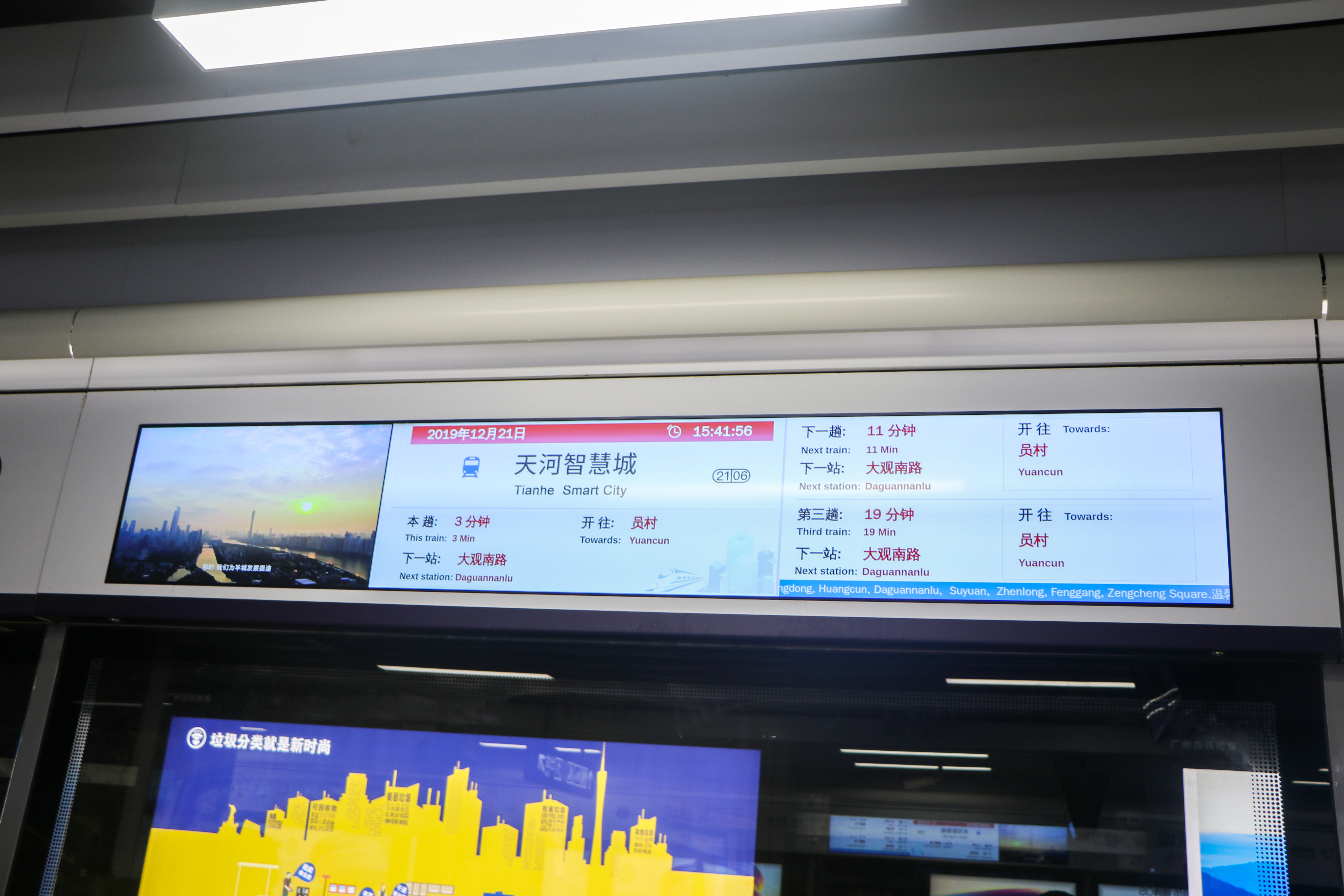 广州地铁天河智慧城站